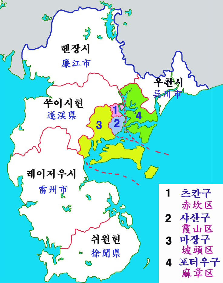 잔장시 현급구역도